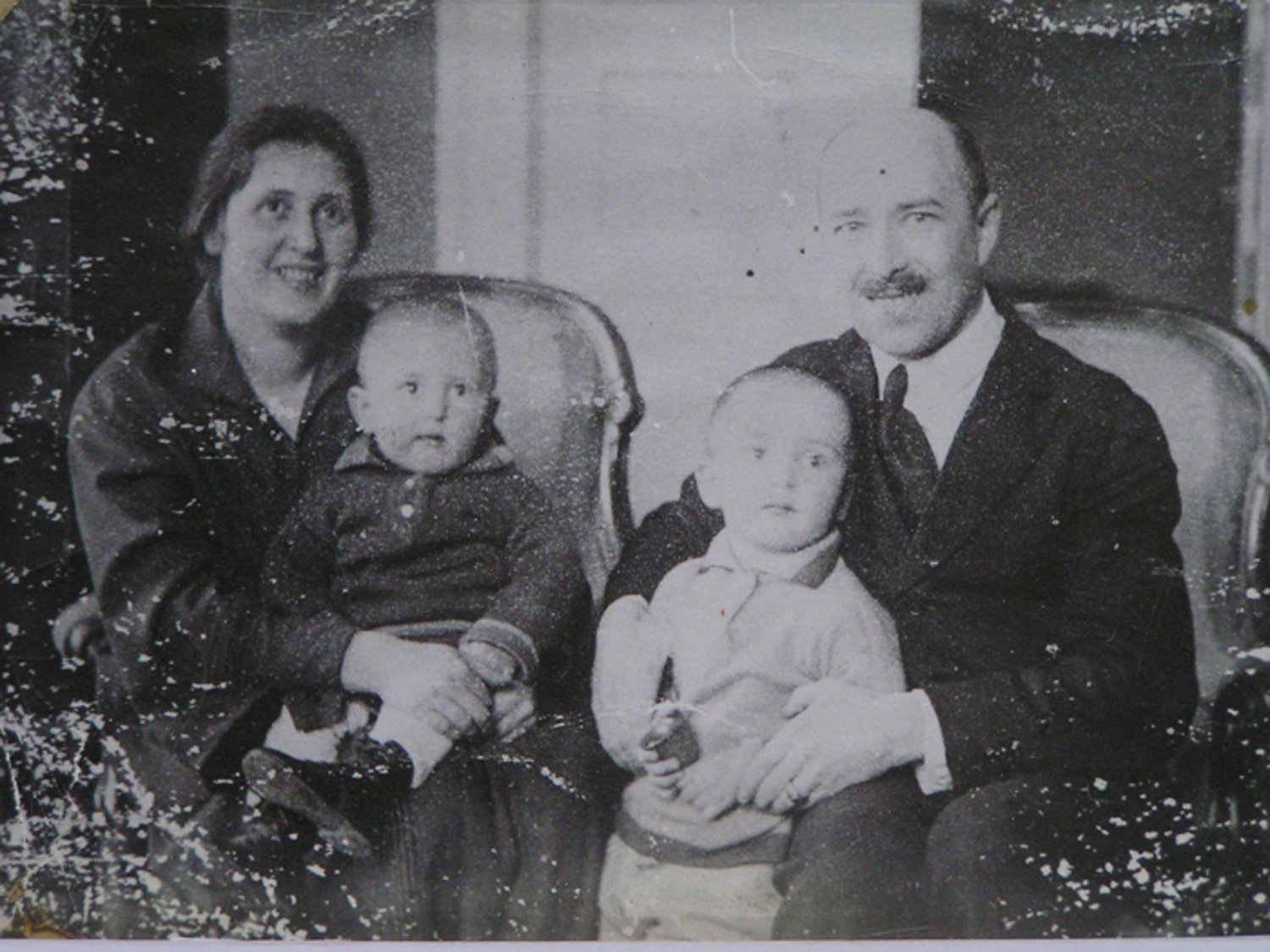 Антон Луцкевіч з жонкай Зоф’яй (Сэркай) Луцкевіч і дзецьмі Юркам і Лявонам.